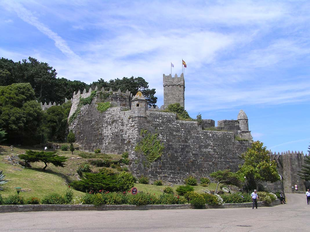 baiona - castle Baiona - zamek